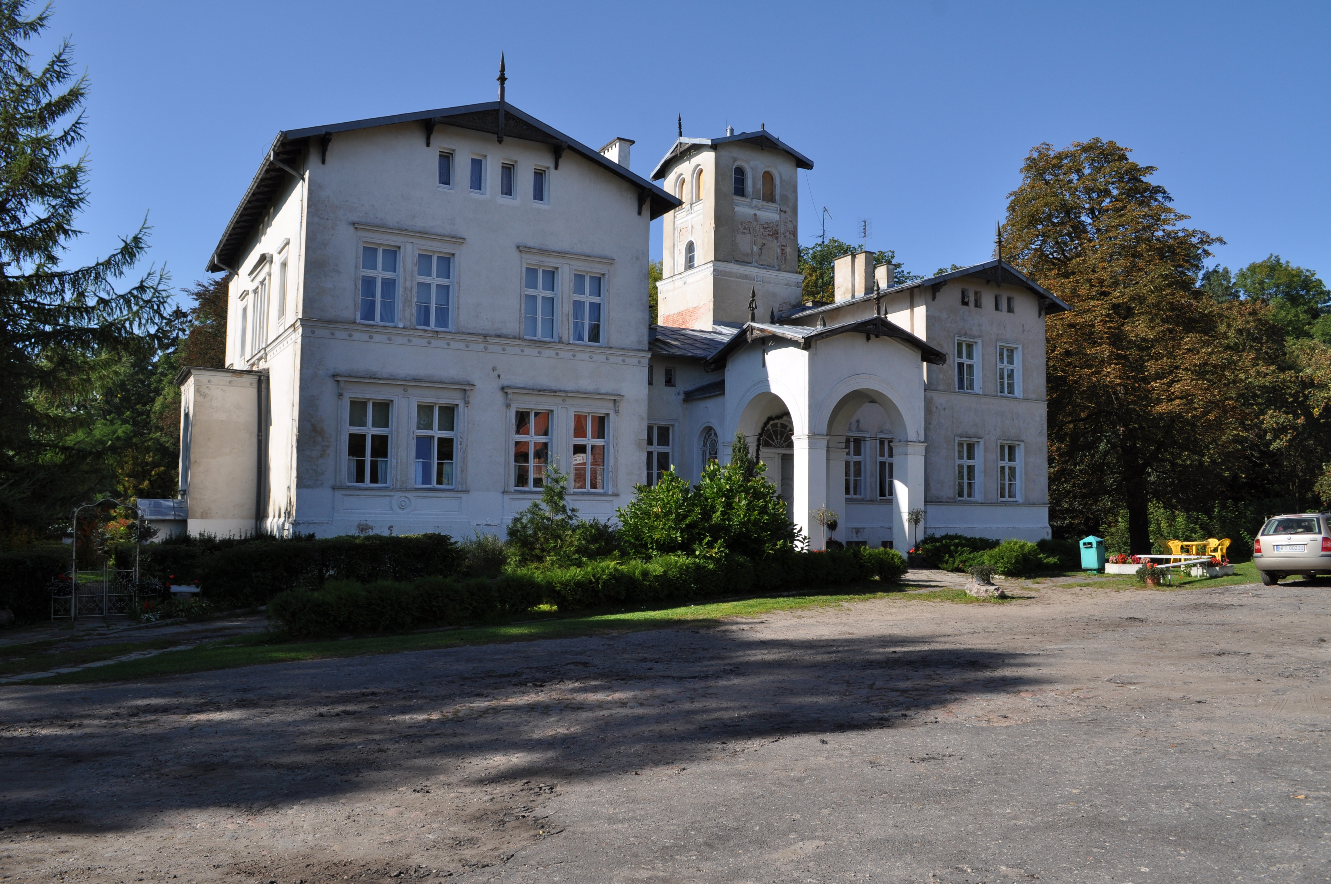 Janów, pałac